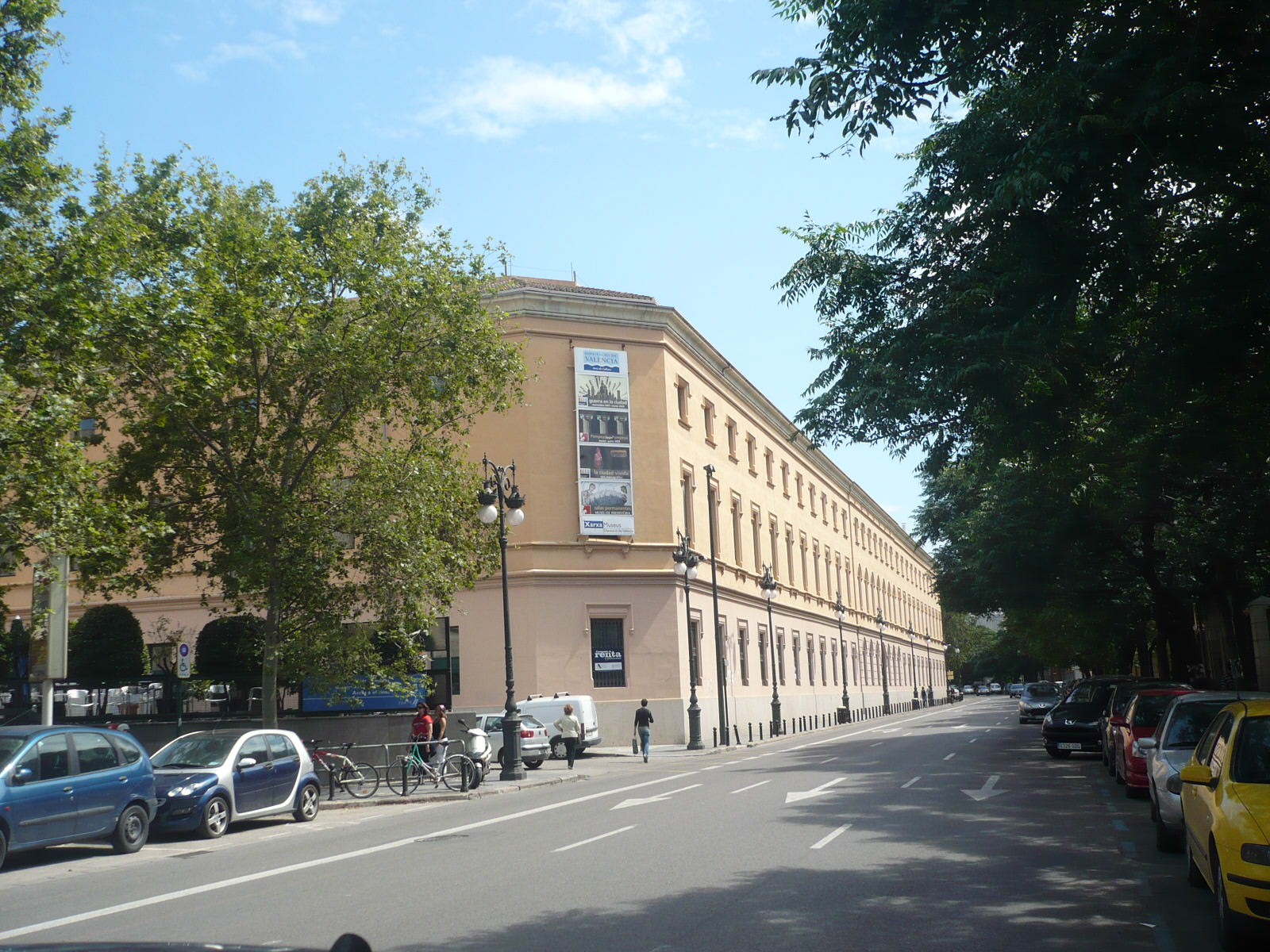 Centro Cultural la Beneficencia. Museo visto desde la Universidad Católica de Valencia.